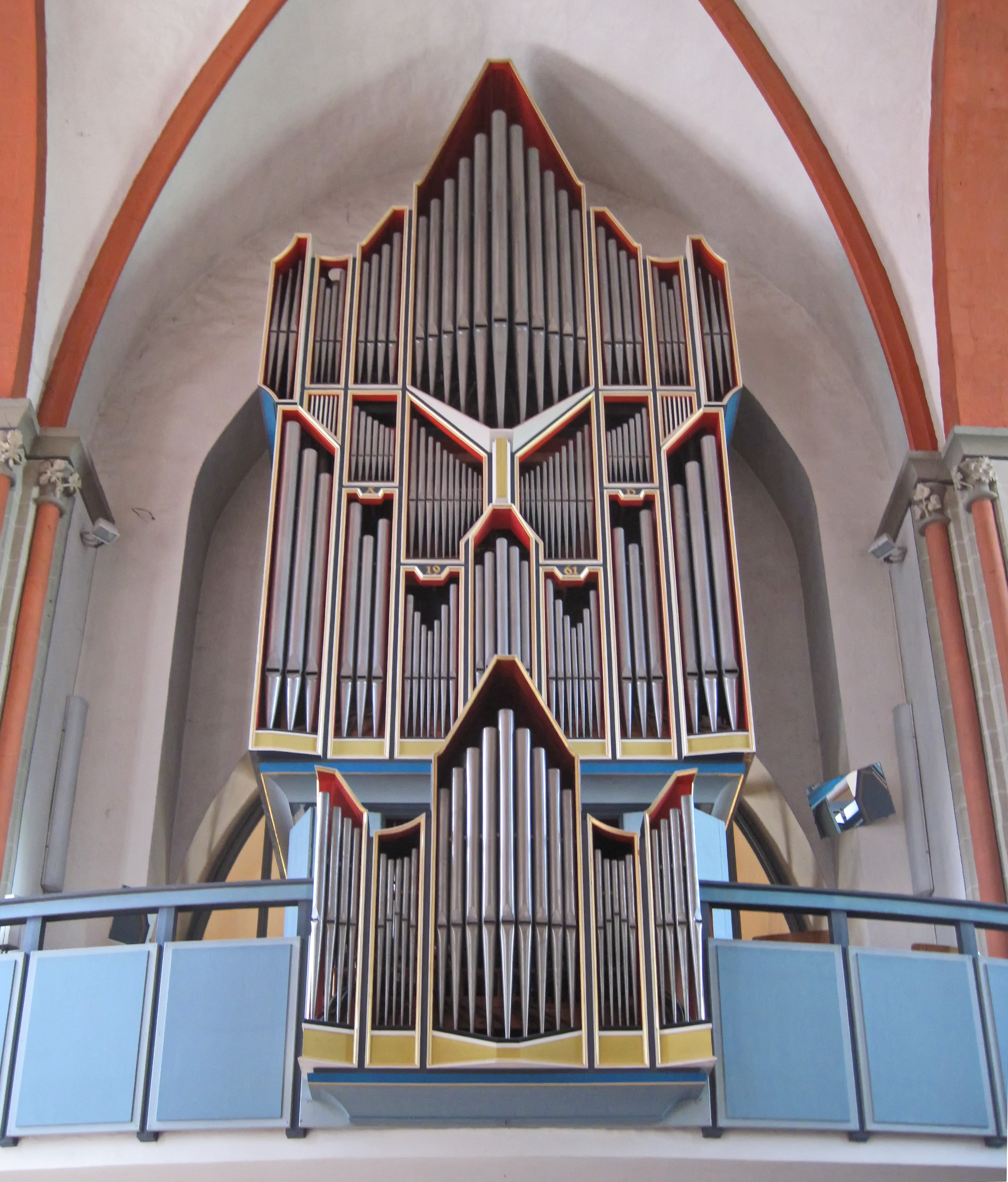 Orgel in der Kirche St. Petri in Braunschweig, An der Petrikirche 3.